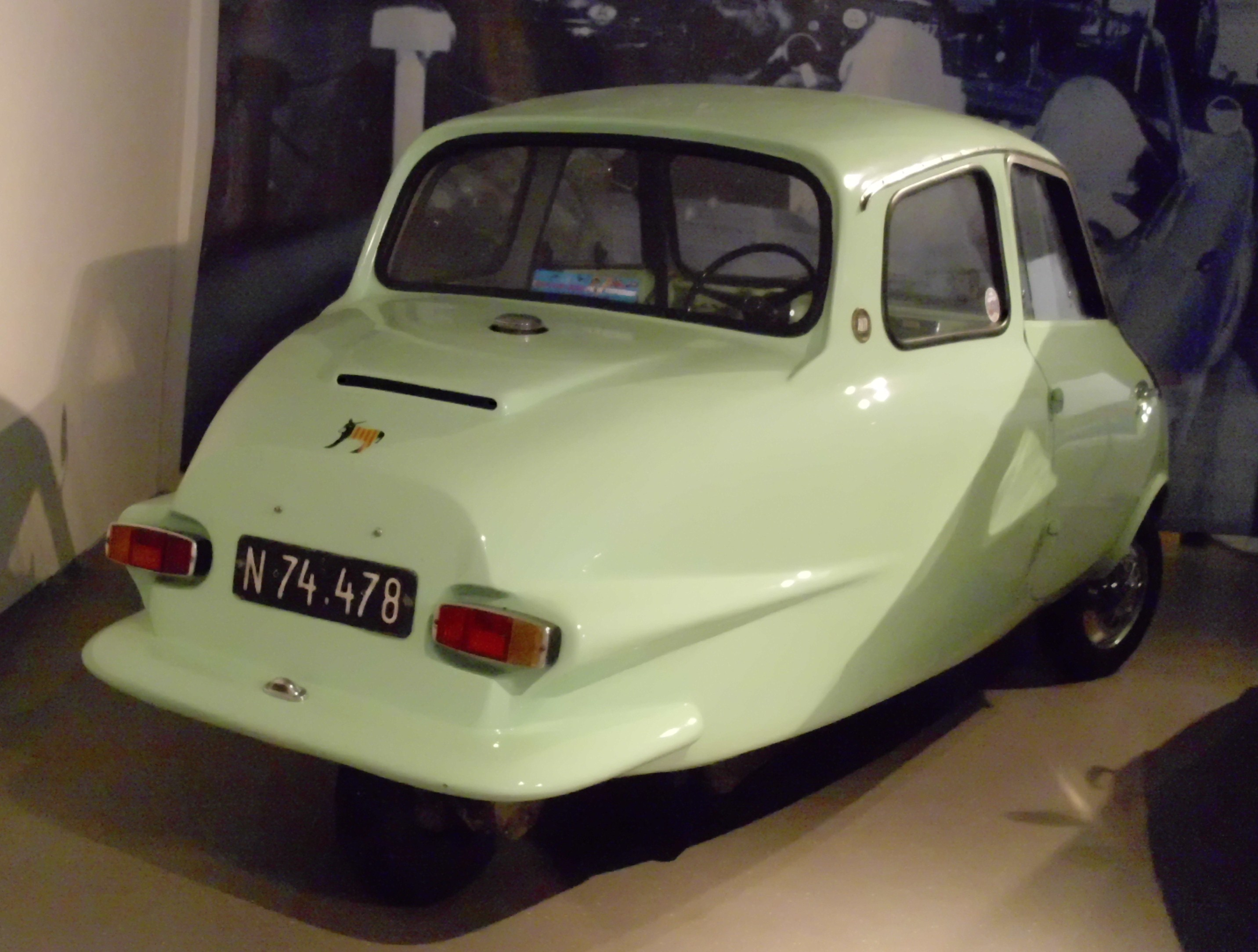 Alta A 200 1968 im RRR Roller, Rollermobile & Wurlitzer-Museum in Eggenburg, Österreich